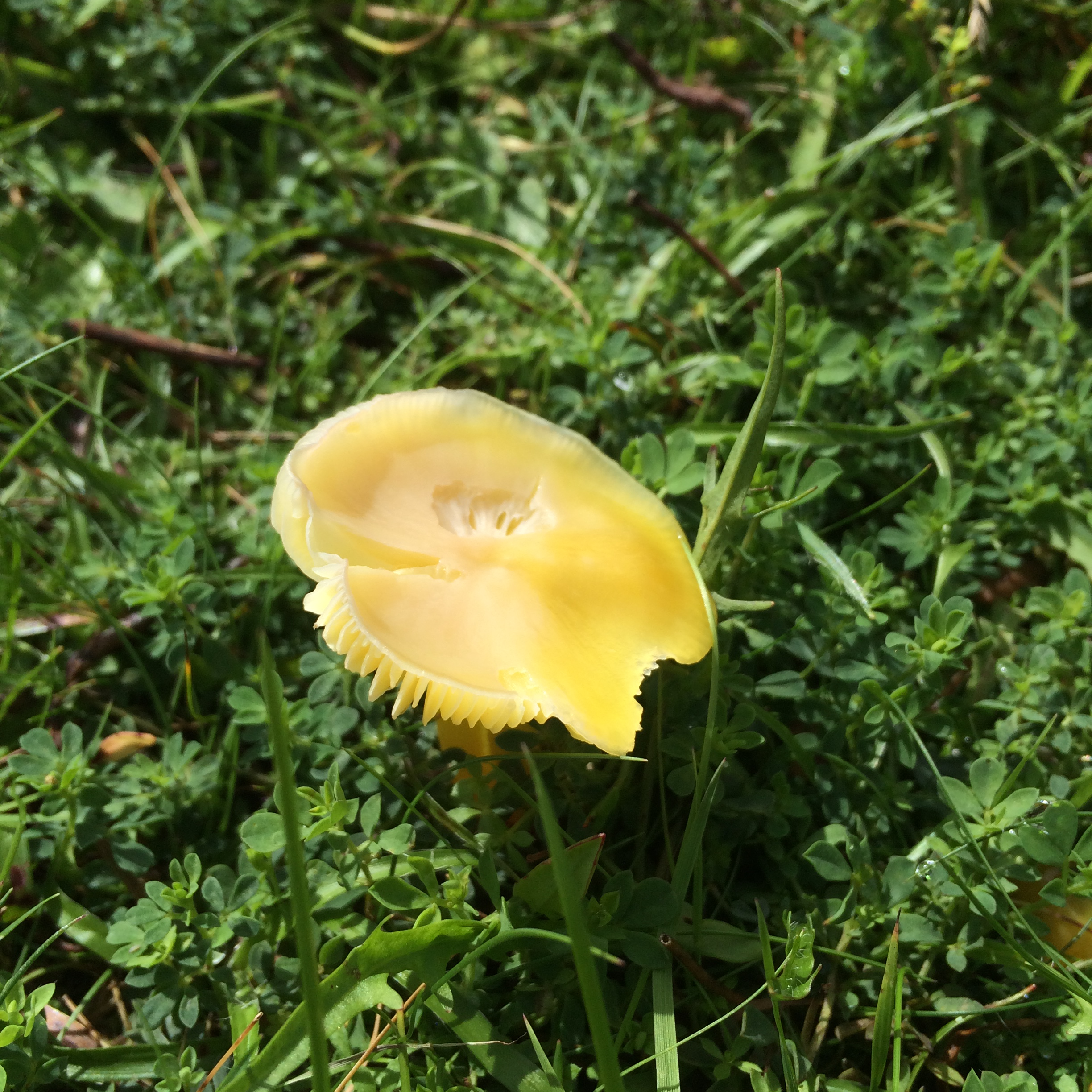 Cap cwyr euraidd (Hygrocybe chlorophana), Heolgerrig, Merthyr Tudful.